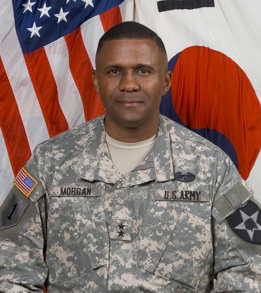 MG John W. Morgan III., Kommnandeur der 2. US-Infanteriedivision